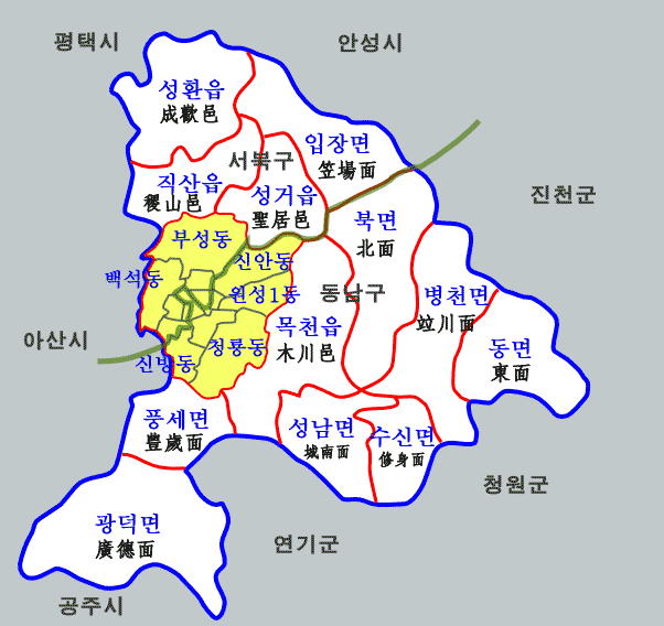 천안시 행정 구역도